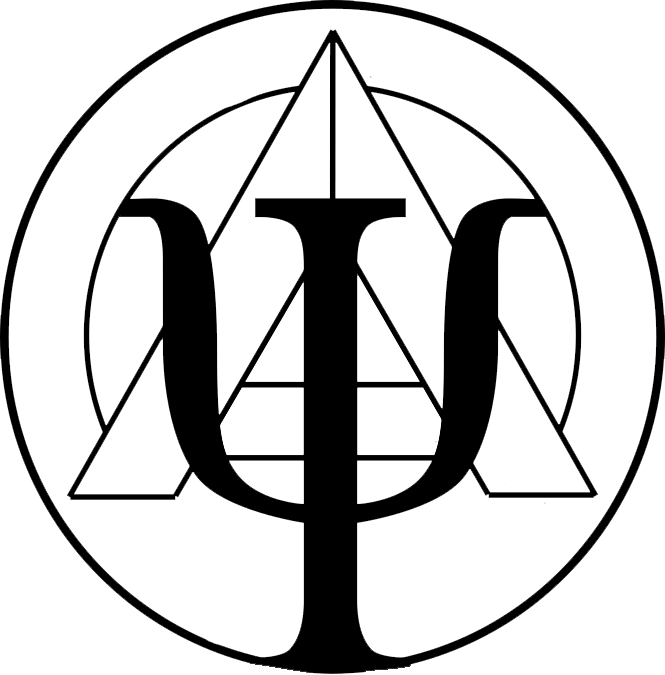 Symbol je zložený z gréckeho písmena "psi", ktoré je klasickým symbolom psychiatrie. Je v kruhu spolu s gréckym písmenom "alfa" symbolizujúce ako iniciál predponu anti-(proti).